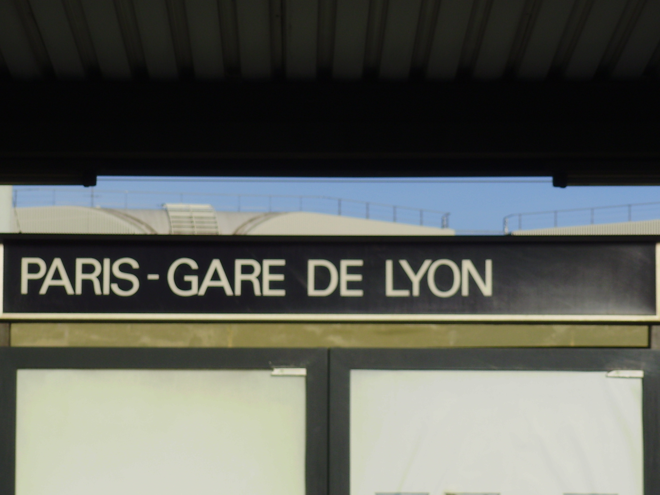 Paris-Gare de Lyon, Paris 12e, France : Panneau signalétique du nom de la gare sur un quai de celle-ci